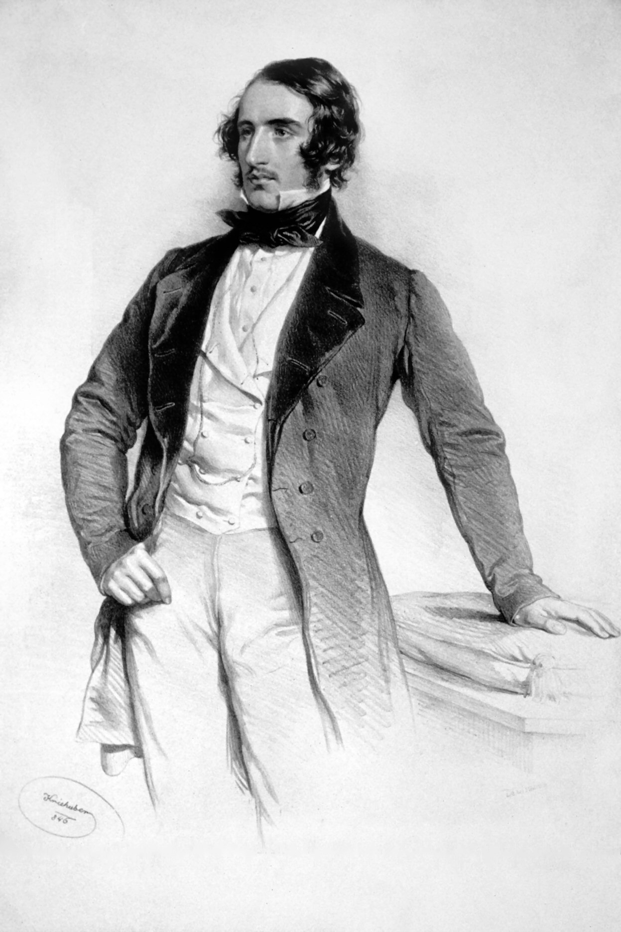 Julian Henry Charles Fane (1827-1870), bitischer Diplomat und Dichter. Lithographie von Josef Kriehuber, 1846